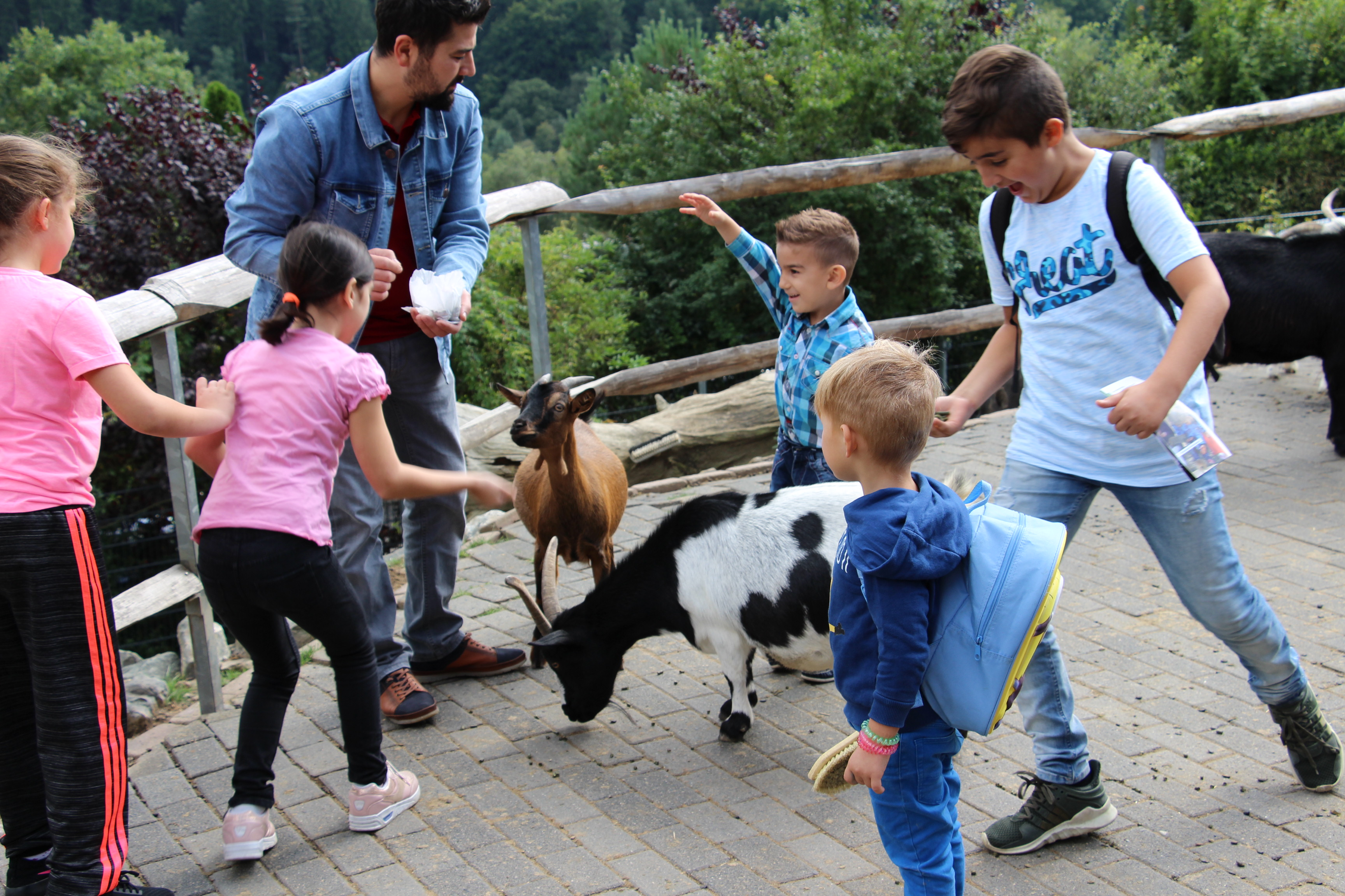 Kinder im Streichelgehege im Tierpark Herborn